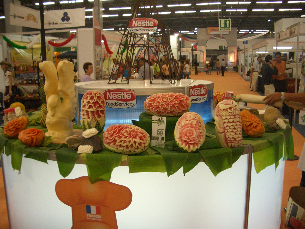 MukimonoMukimono